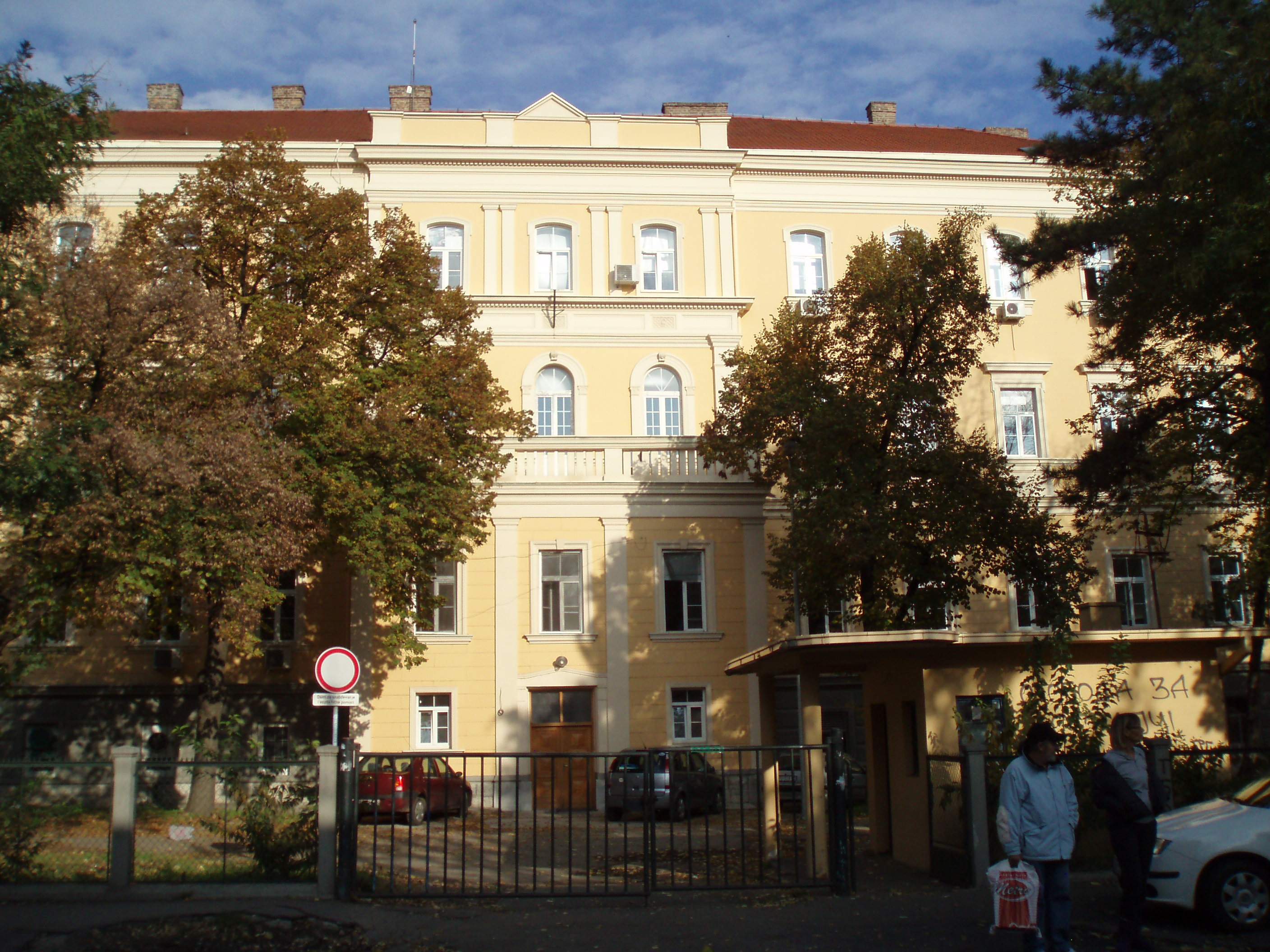 KBC Zemun (Zemunska bolnica), stari deo zgrade, autor fotografije: Nicolo